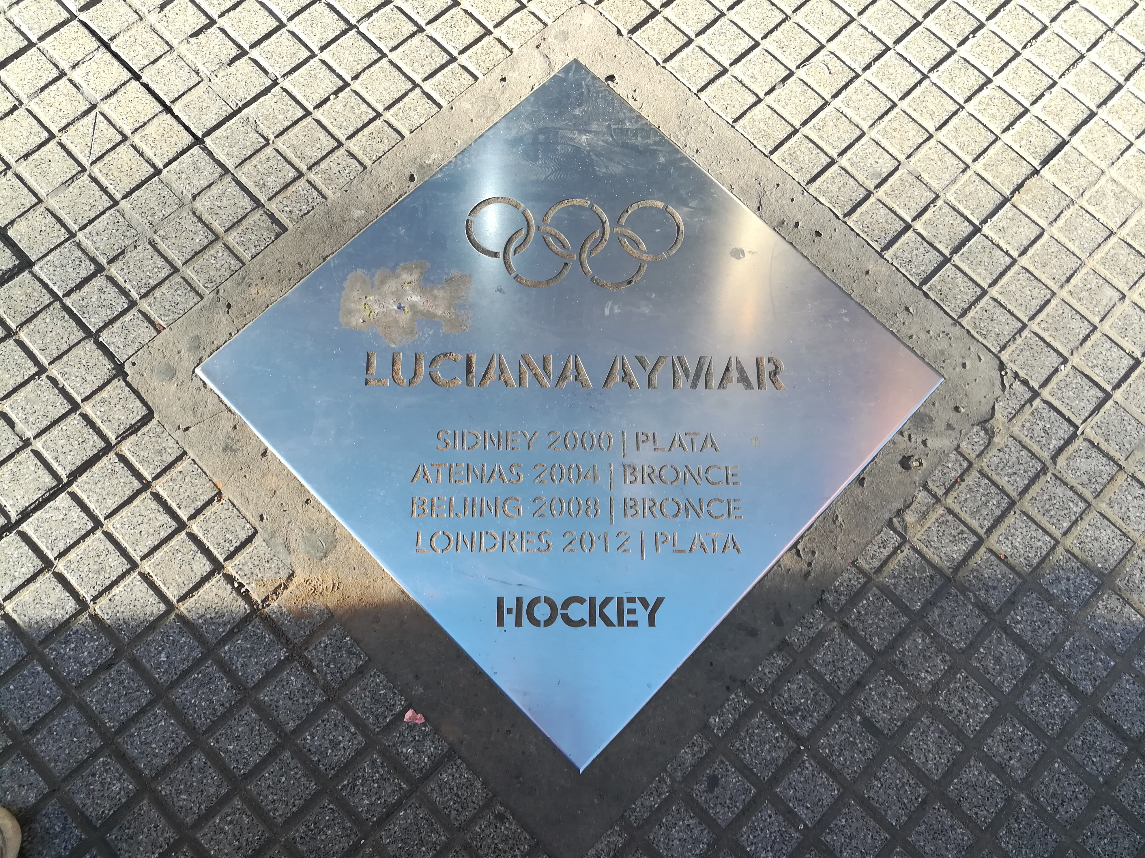 Paseo de los Olímpicos de los en la Avenida Pellegrini (Rosario).